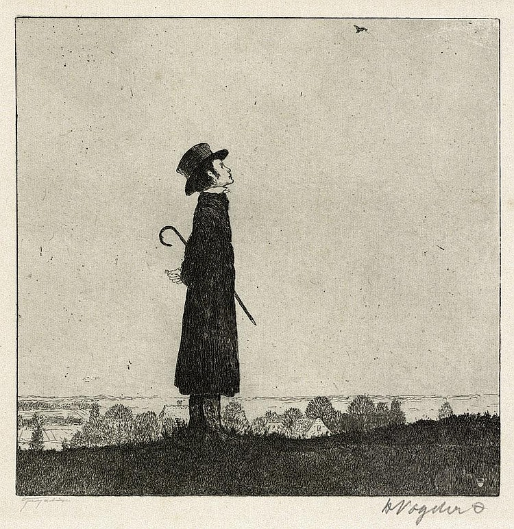 Die Lerche. Radierung auf chamoisfarbenem Japan. 15,7 x 15,7 cm (Plattenrand); signiert, auch vom Drucker Otto Felsing.